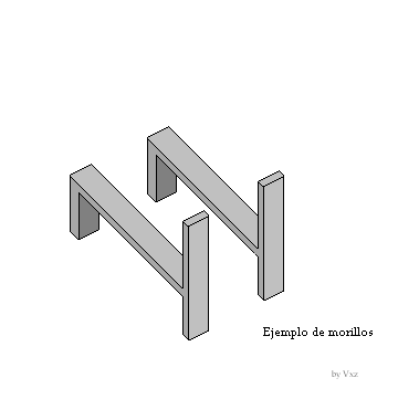 Morillo o morillos (pues se usa en parejas), es el nombre de un utensilio para el hogar compuesto por dos barras metálicas (y en su origen de cerámica) que sirven de caballete o soporte para la leña apoyados en el suelo, facilitando la combustión. Tradicionalmente se utilizaban para depositar los pucheros sobre el fuego y calentar o cocer la comida y solían estar decorados o labrados con figuras de "moros", de donde según informa el DRAE (Diccionario de la Real Academia de la Lengua Española), parece provenir la denominación. Una vez generadas brasas, también pueden servir de apoyo a los recipientes que se coloquen sobre ellas.